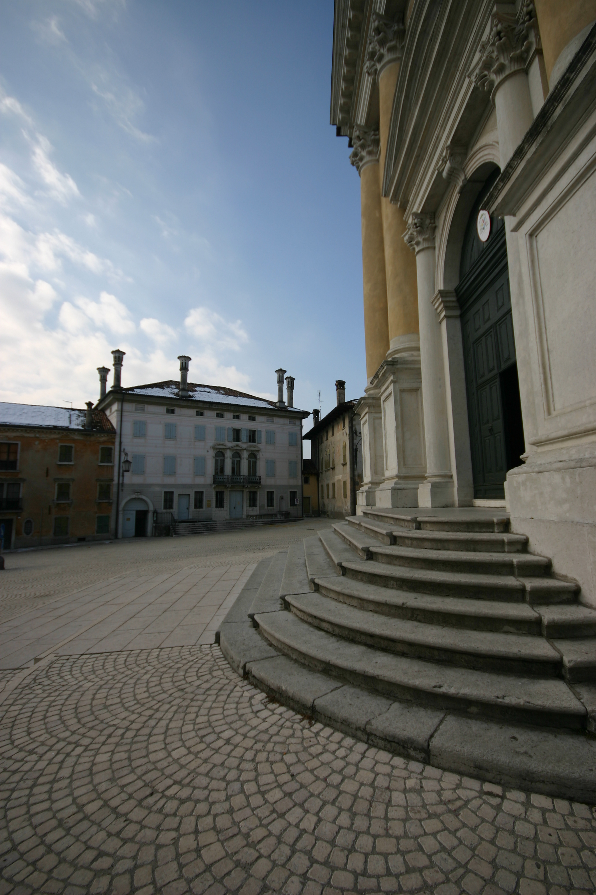 Piazza di Mel piccolo gioiello vicino a Feltre